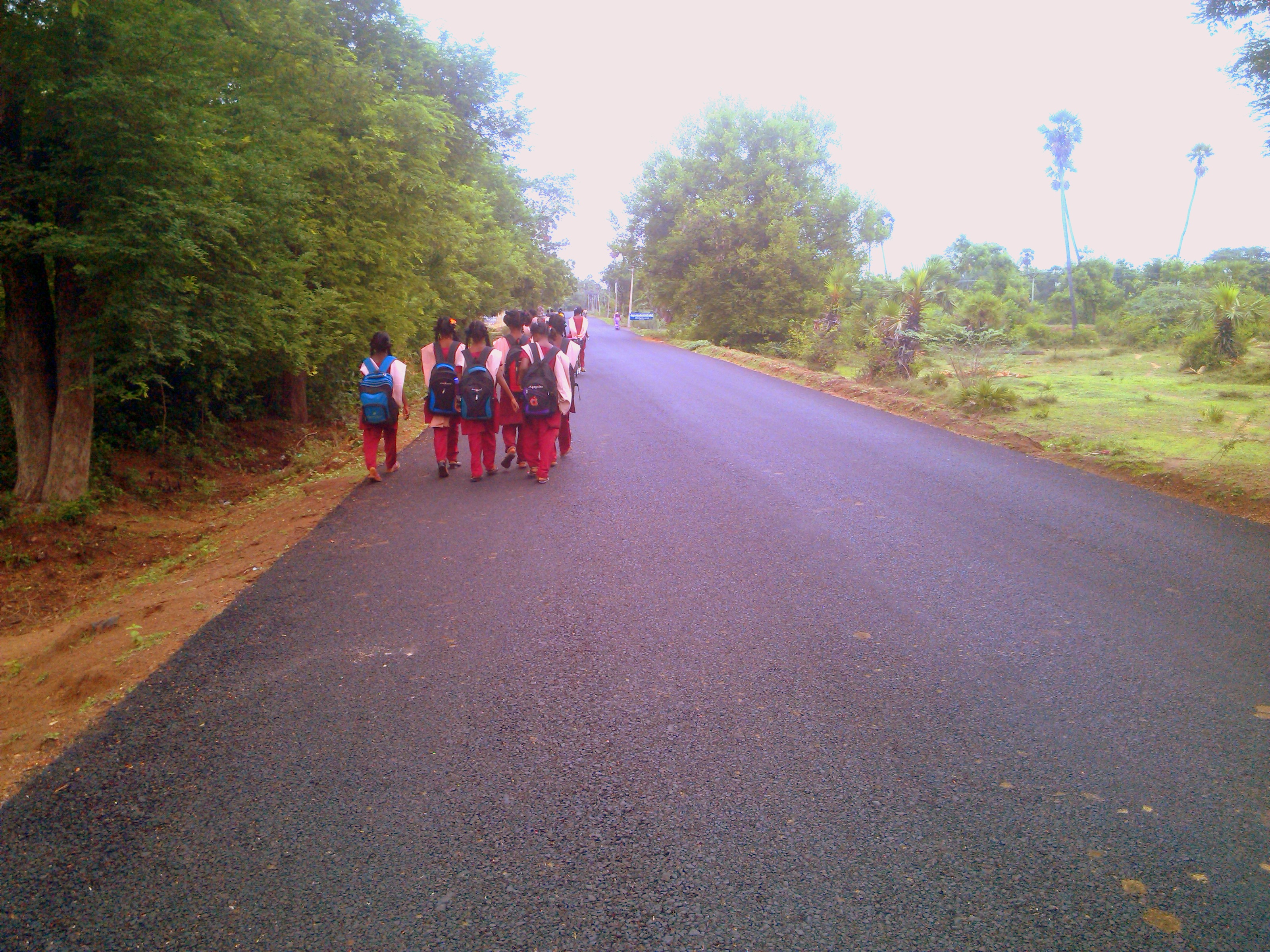 காஞ்சிபுரம் - களியாம்பூண்டி கிராம சாலை